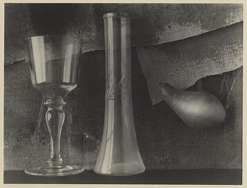 František Provazník´s photograph. Fotografie Františka Provazníka.